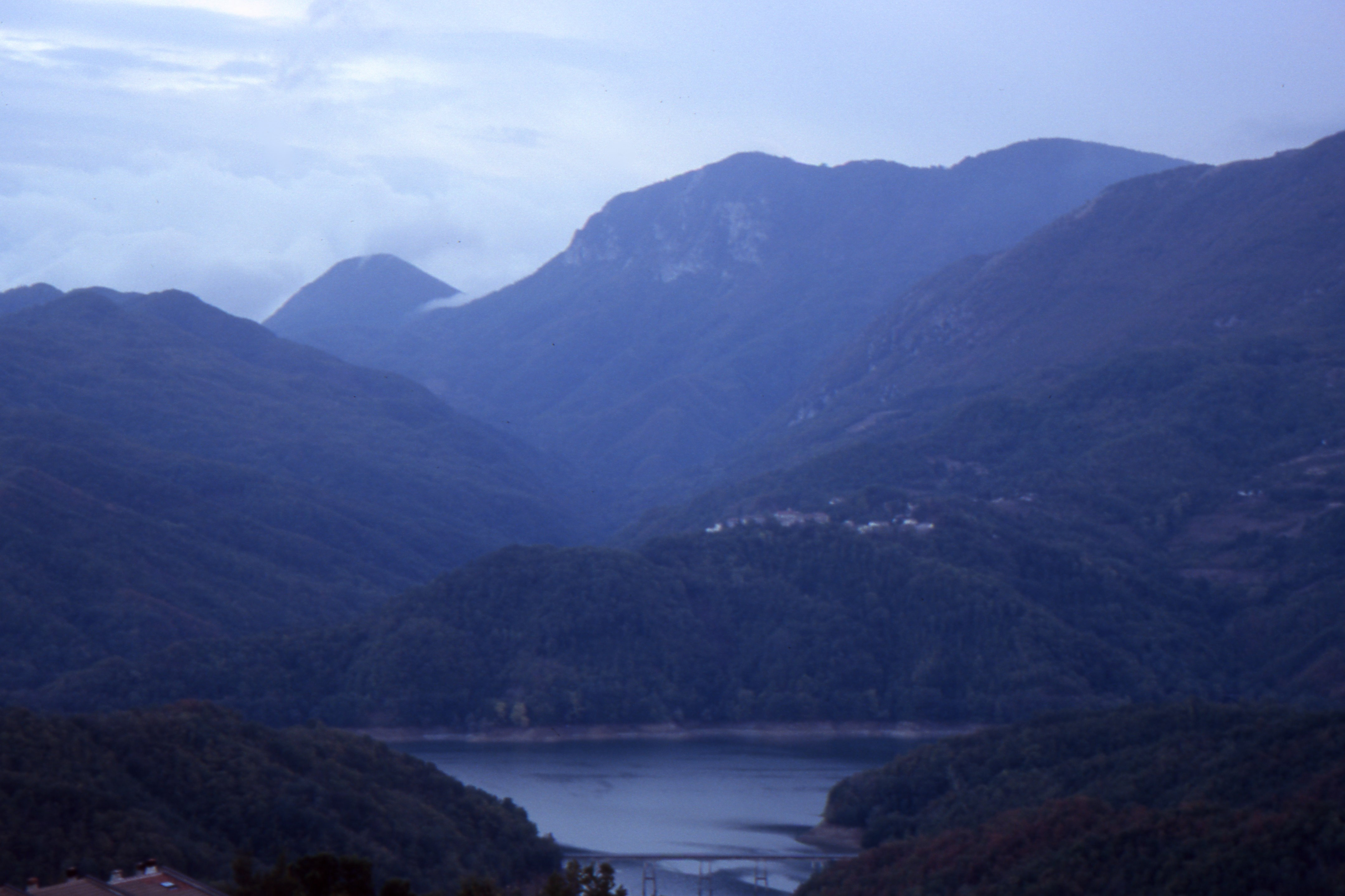 Scorcio del Lago del Salto dall'abitato di Petrella; sullo sfondo il borgo di Poggio Vittiano e il Monte Navegna